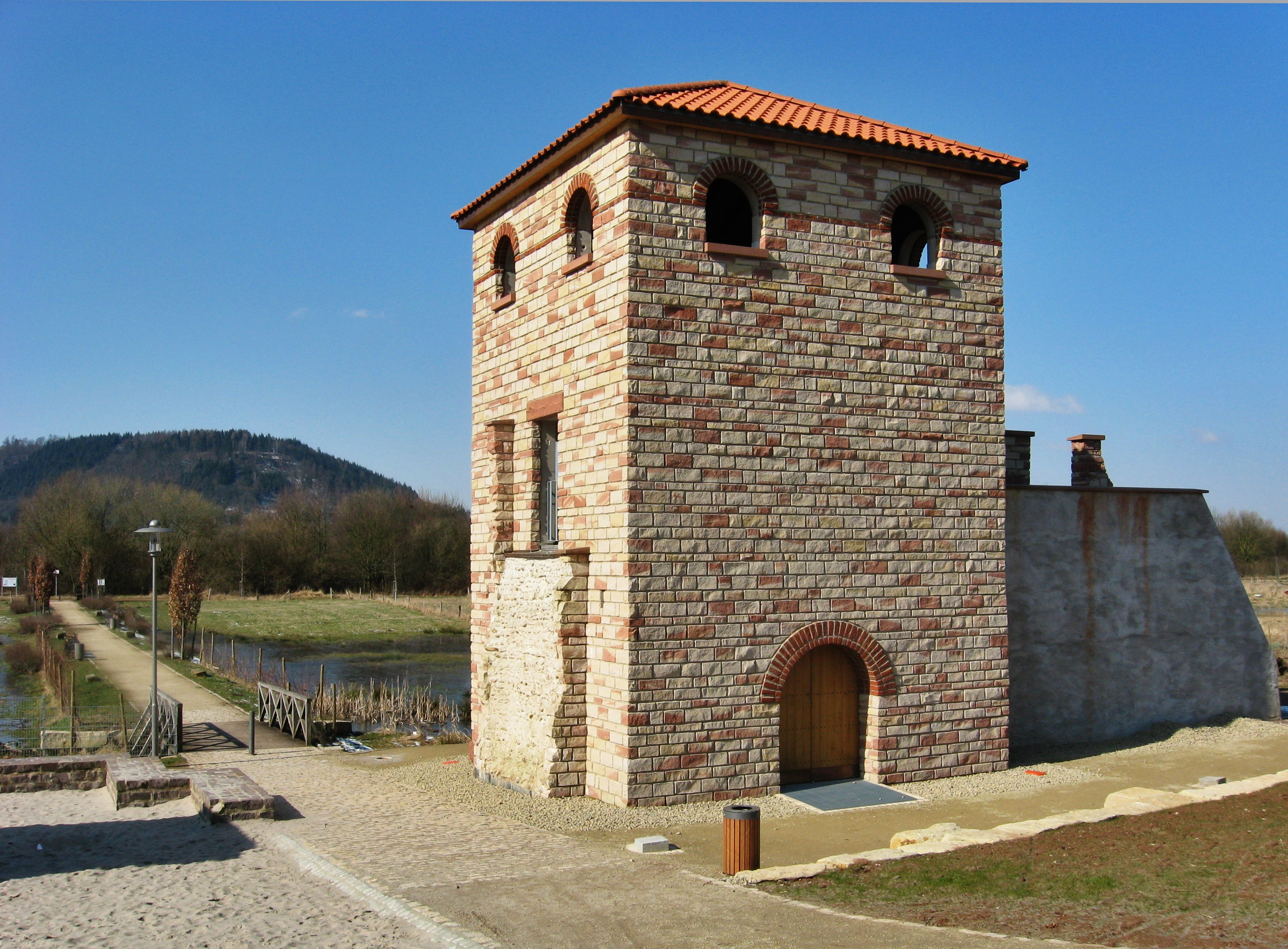 Nachbildung des Turms eines Römerkastells in Pachten